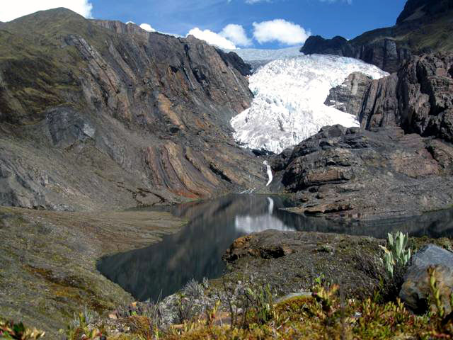 Laguna Pagarisha, ubicada en las faldas del nevado Perlilla. a 4462 msnm.